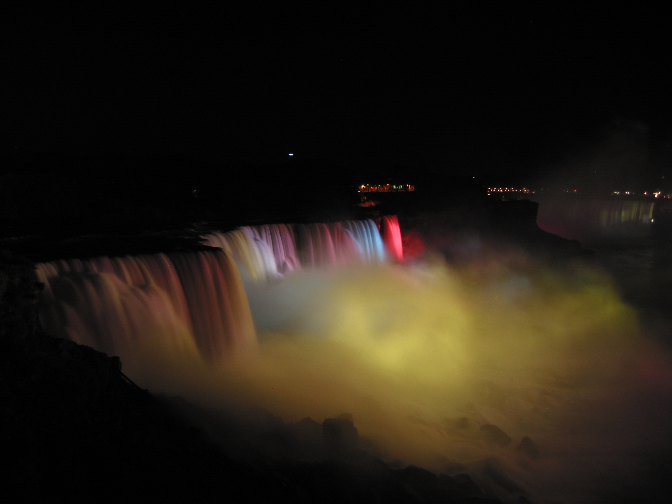 നയാഗ്ര വെള്ളച്ചാട്ടം രാത്രിയിലെ ദൃശ്യം